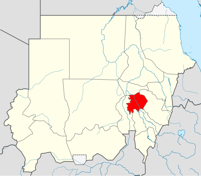 Locator map